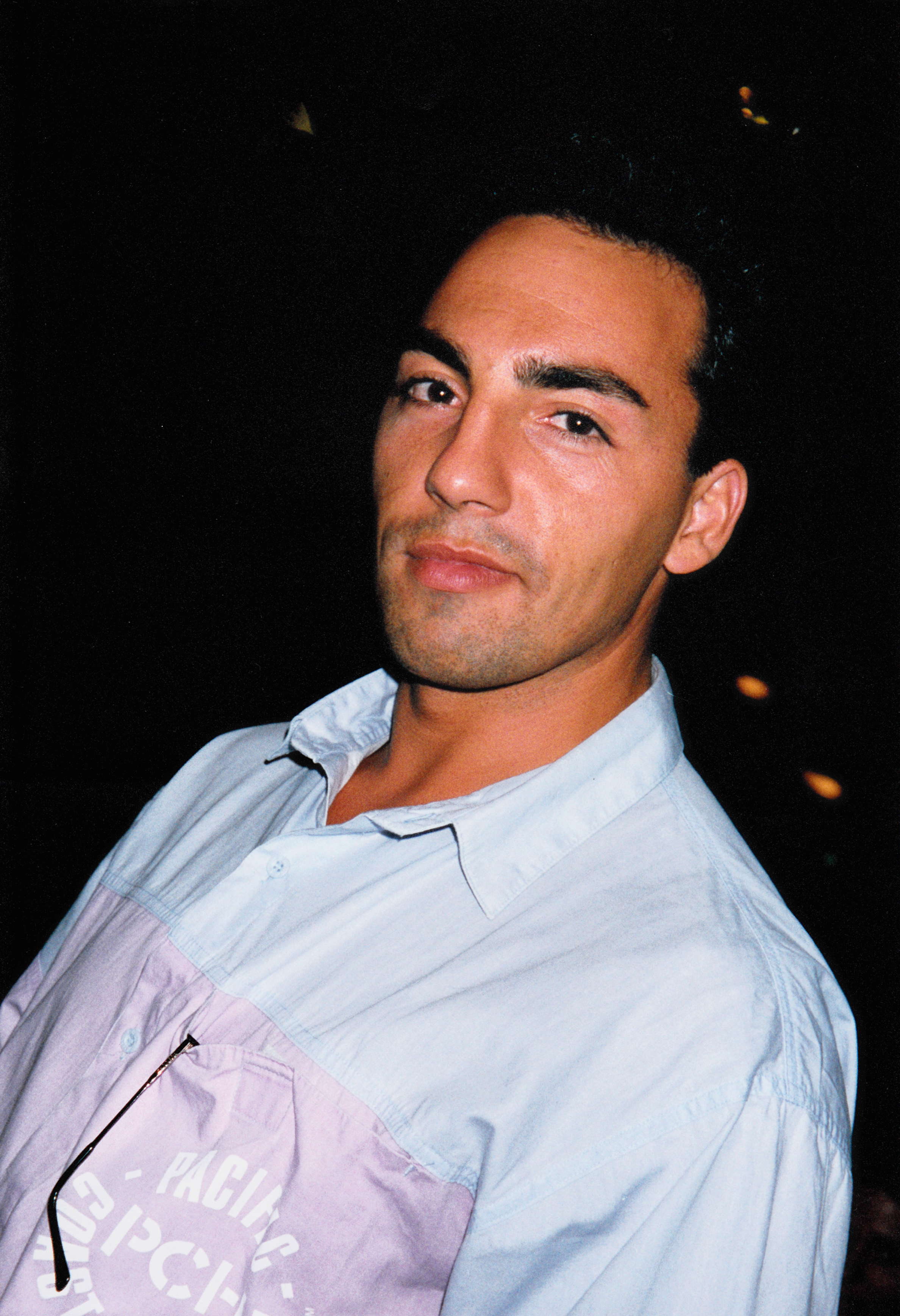 Portrait: José Manuel Egea, mehrfacher Karate-Weltmeister Kumite